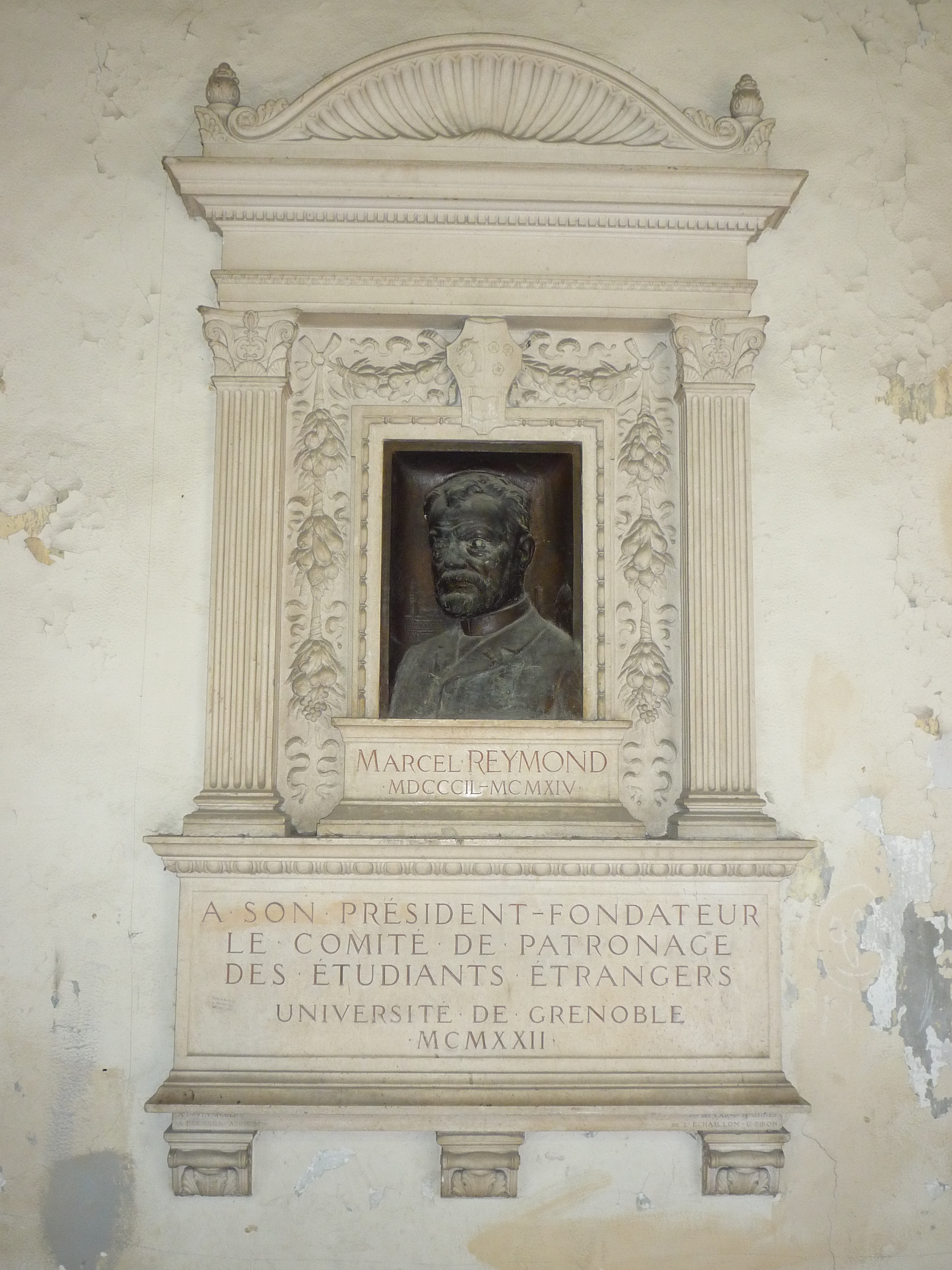 Buste de Marcel Reymond (1849-1914) dans l'aile Vieux-Temple du Couvent des Minimes de Grenoble.